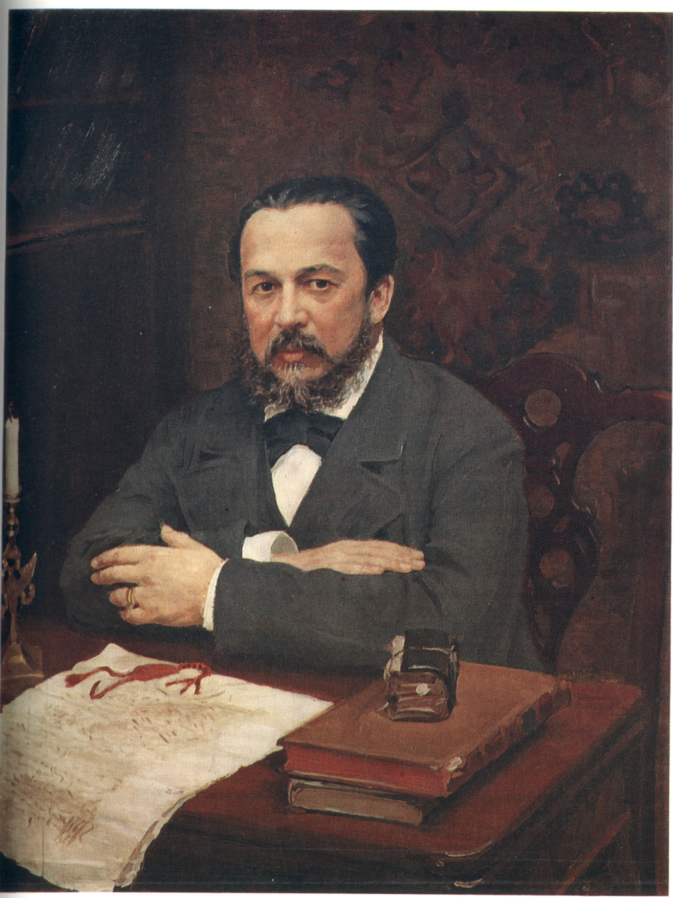 Куликов И.С. Портрет археолога А.С.Уварова, 1916